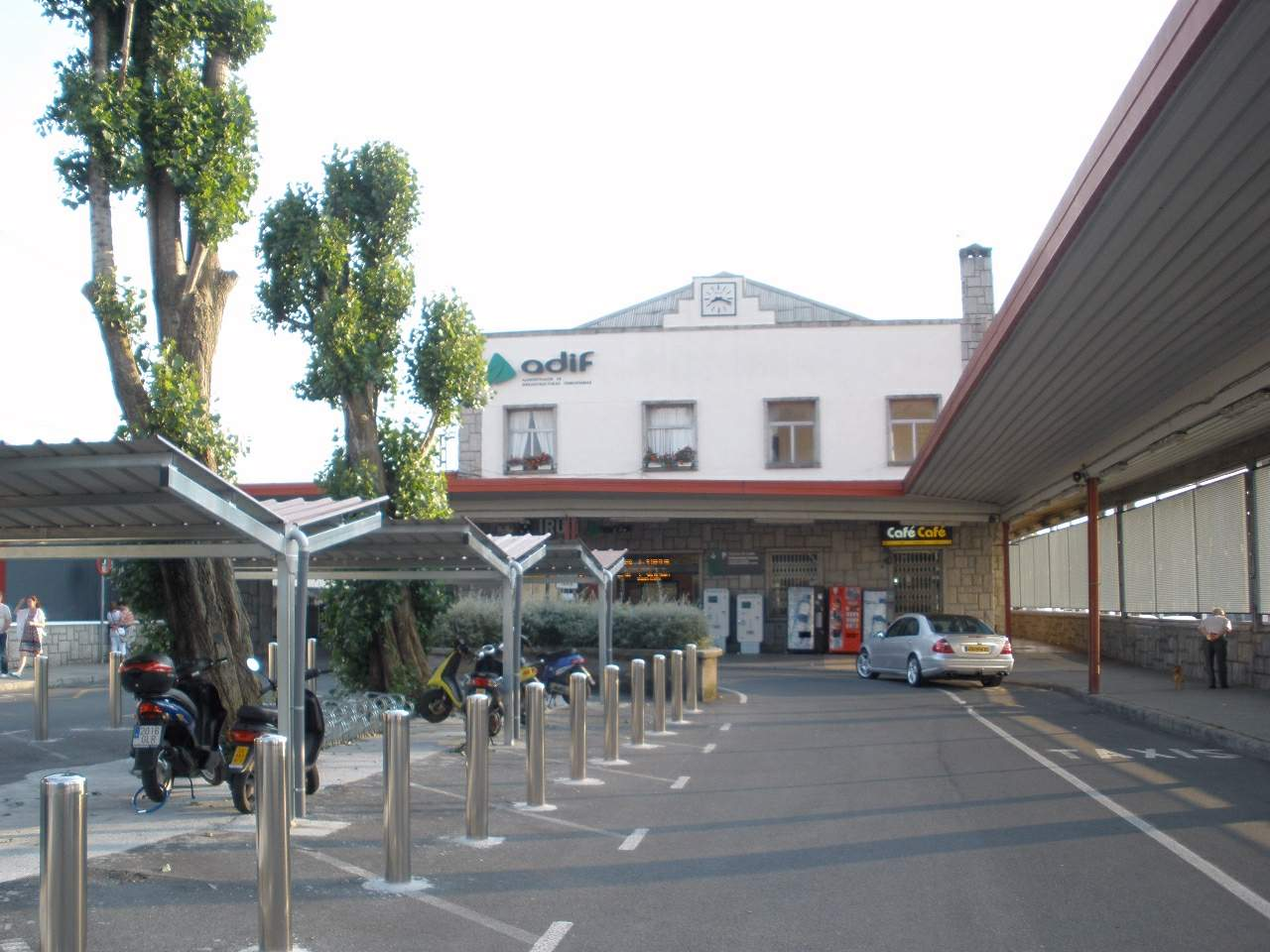 Estación de Irún